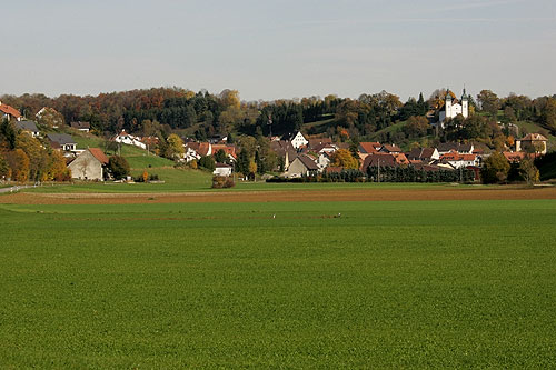 Seewen (SO)